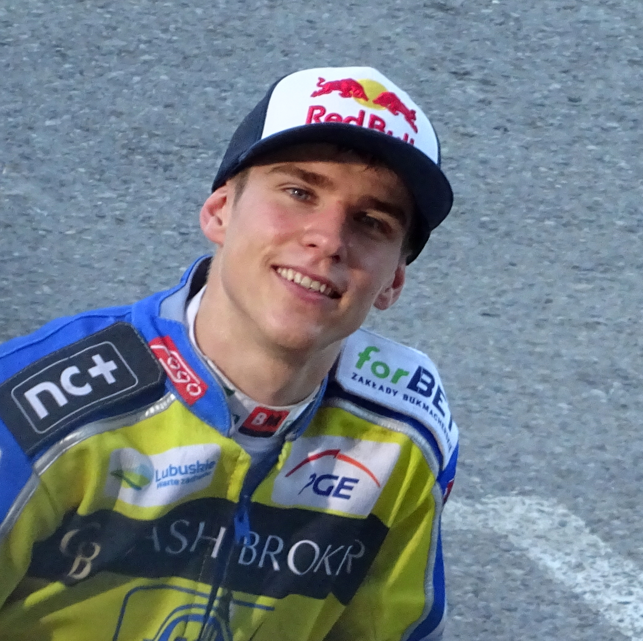 Przemysław Pawlicki w barwach Stali Gorzów (Cash Broker Stal Gorzów Wielkopolski).